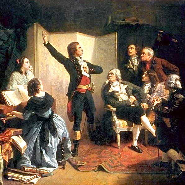 Rouget de Lisle chantant la Marseillaise